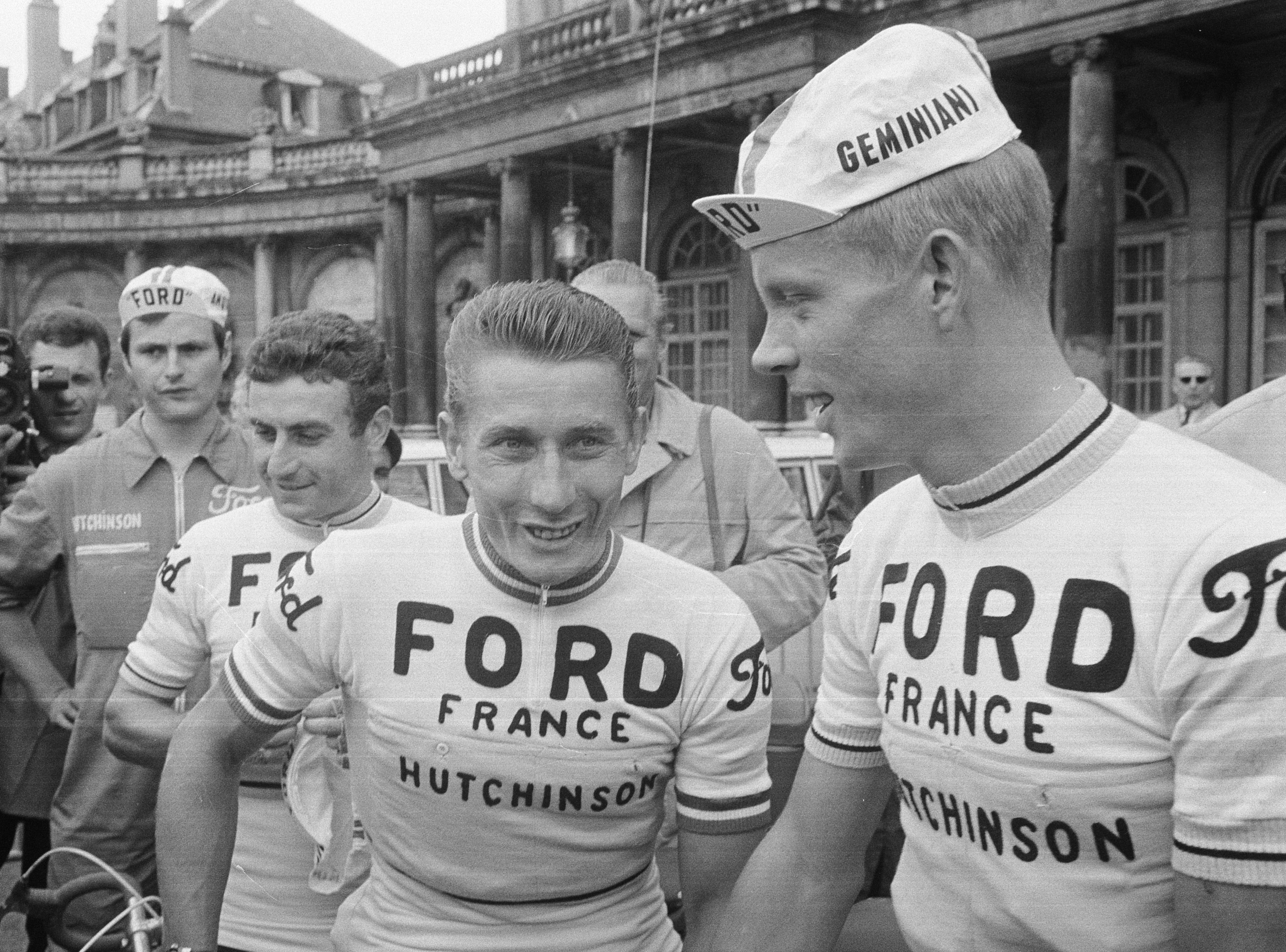 Lucien Aimar, Jacques Anquetil and Arie den Hartog at the Tour de France 1966.